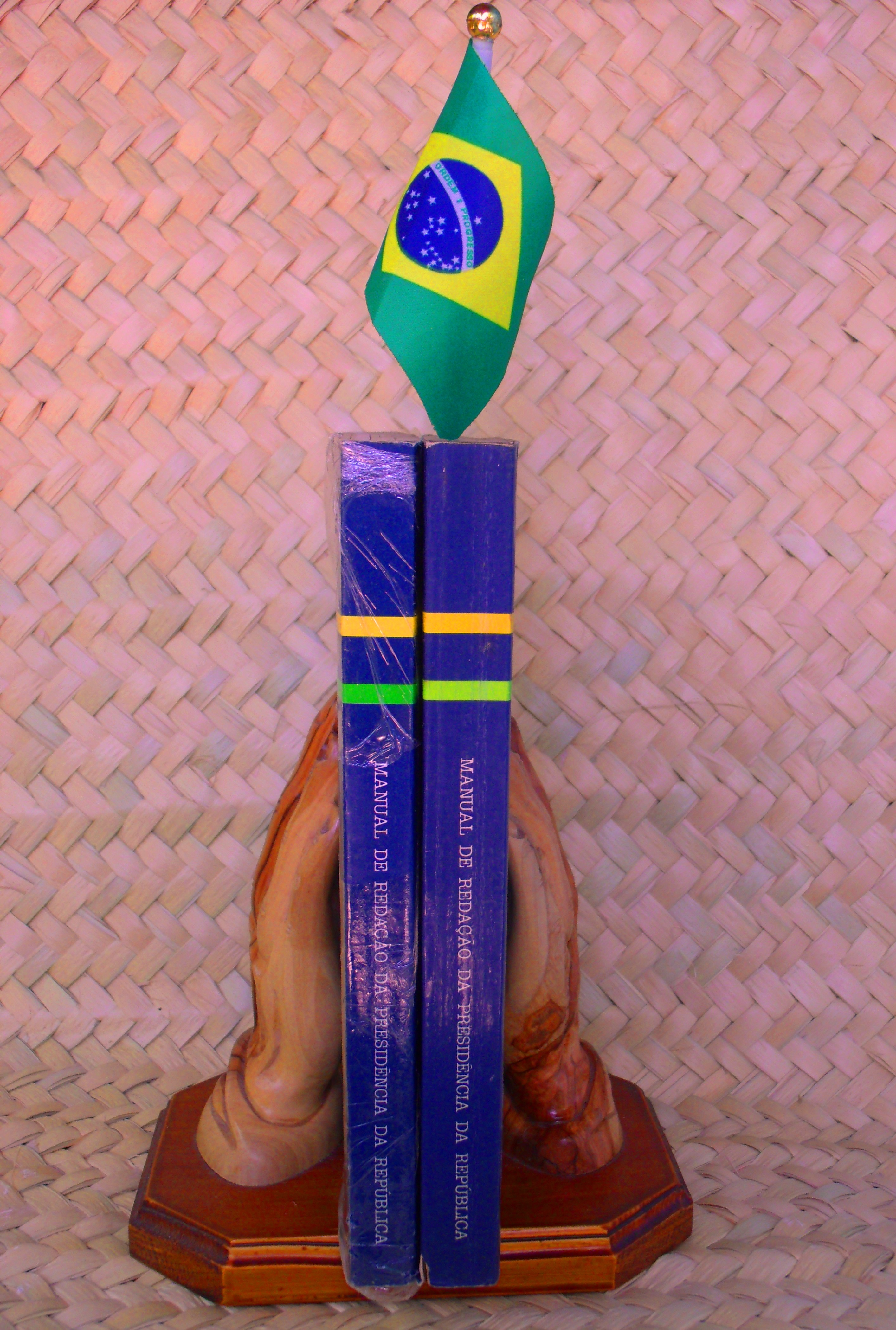 Dois livros do Manual de Redação da Presidência da República (Brasil).